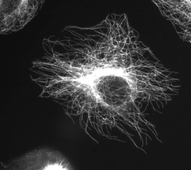 eigen foto, gemaakt in het erasmusMC, Kleuring van microtubuli in een gefixeerde cel mbv anti-beta-tubuline antilichamen